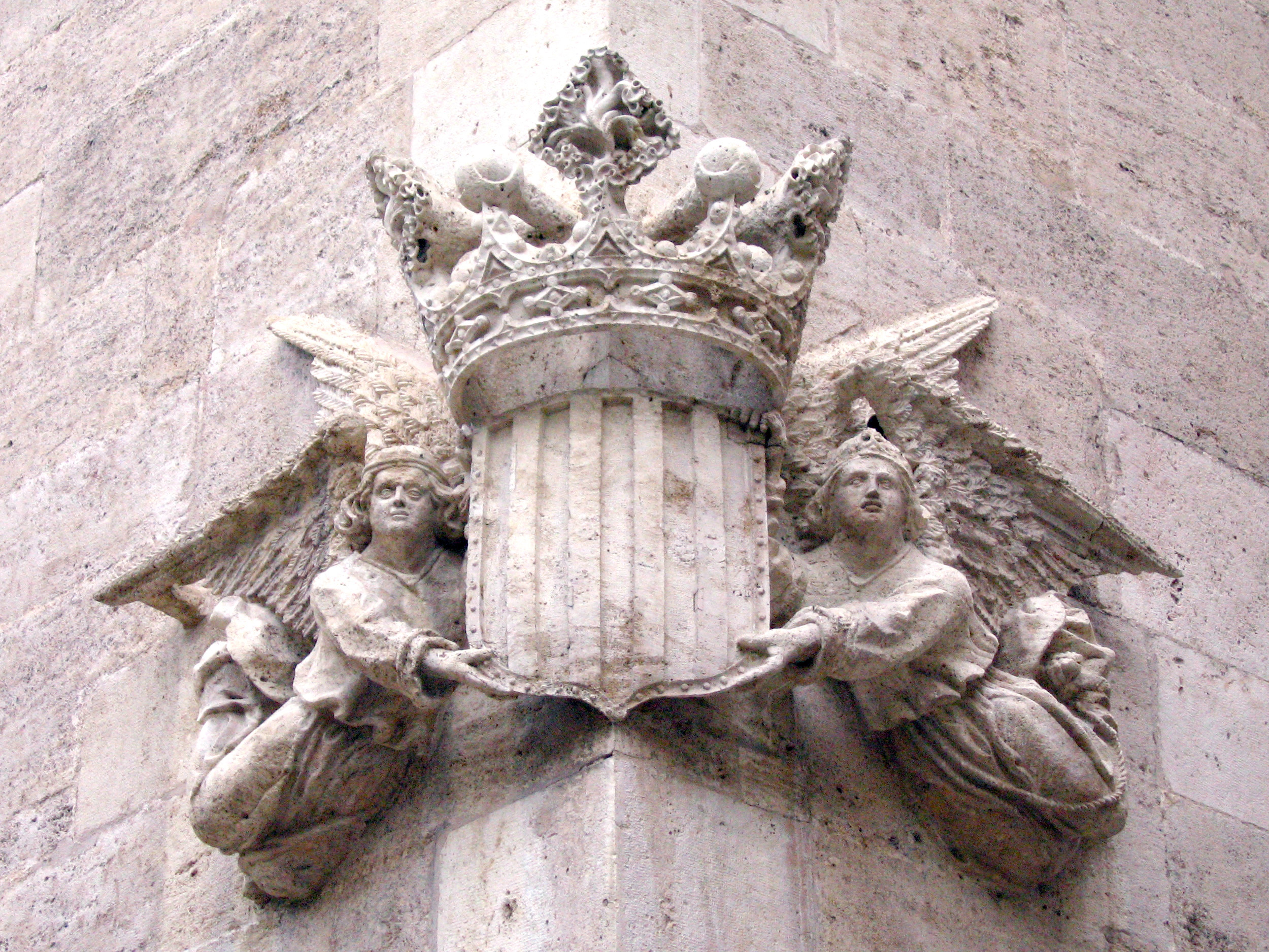 Escut reial a la Llotja de València